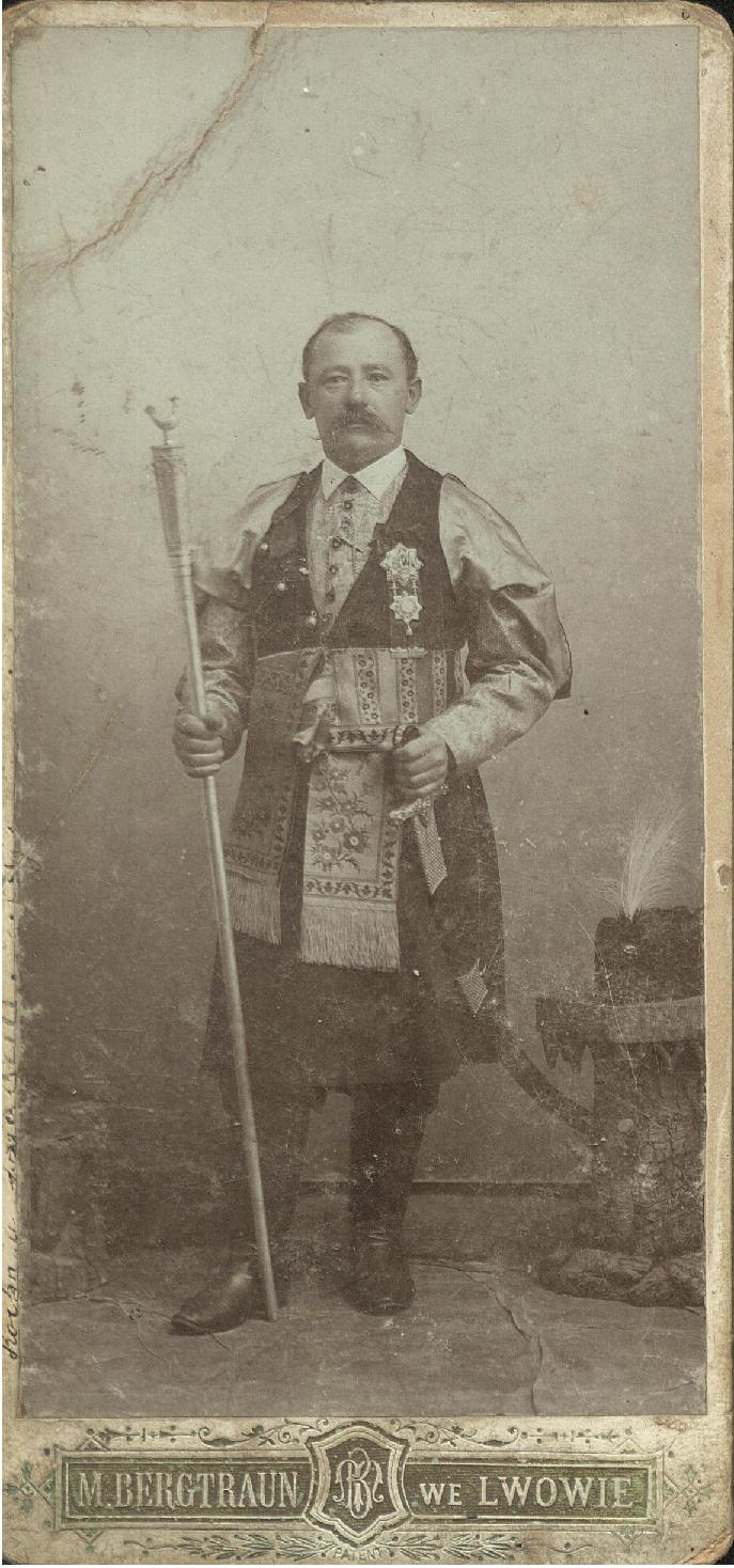 Jan Makan w uroczystym stroju marszałka Lwowskiego Bractwa Kurkowego